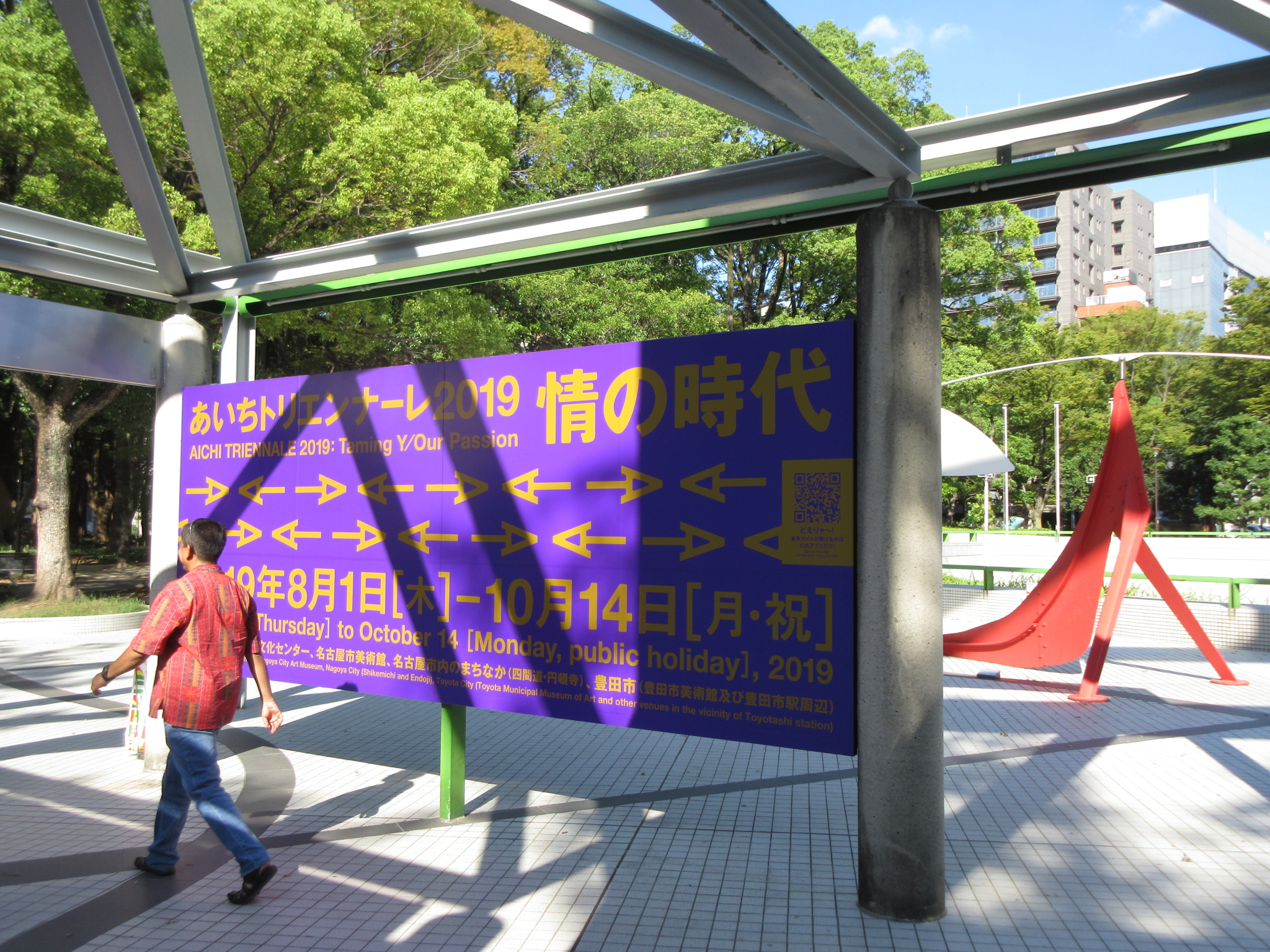 名古屋市美術館（名古屋市中区栄）。あいちトリンエナーレ2019の会期中。